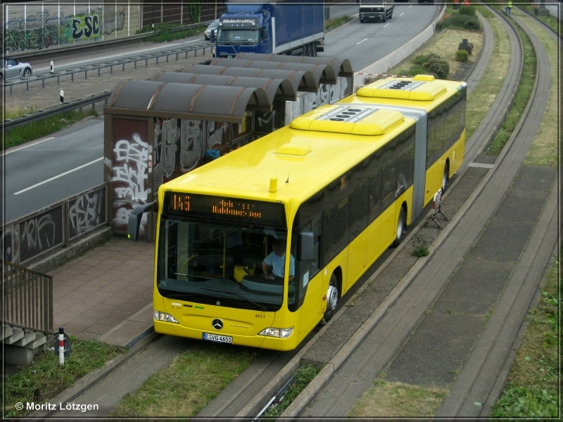 4651 am Feldhaushof